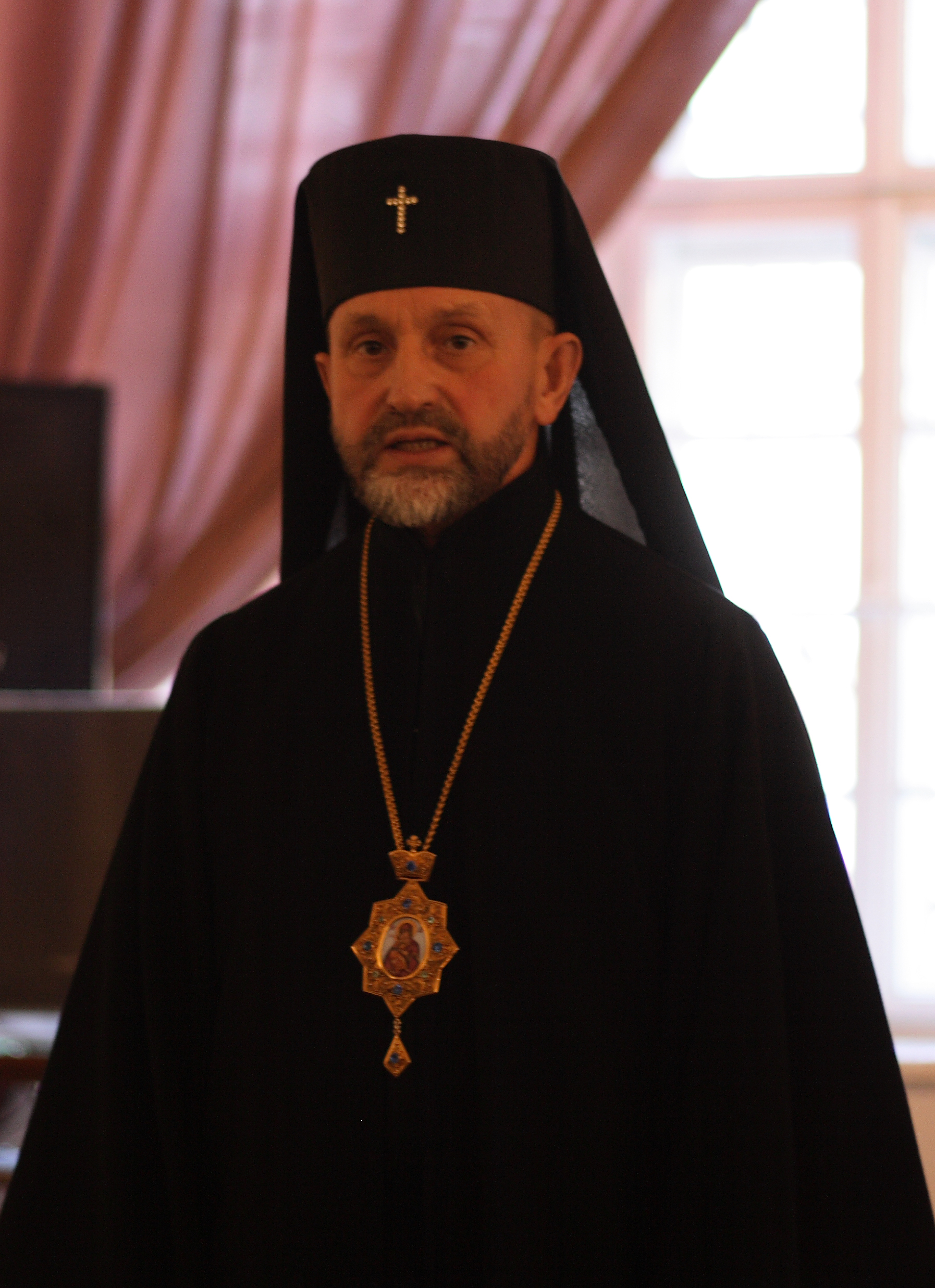 Игорь Возьняк, архиепископ Львовский, УГКЦ